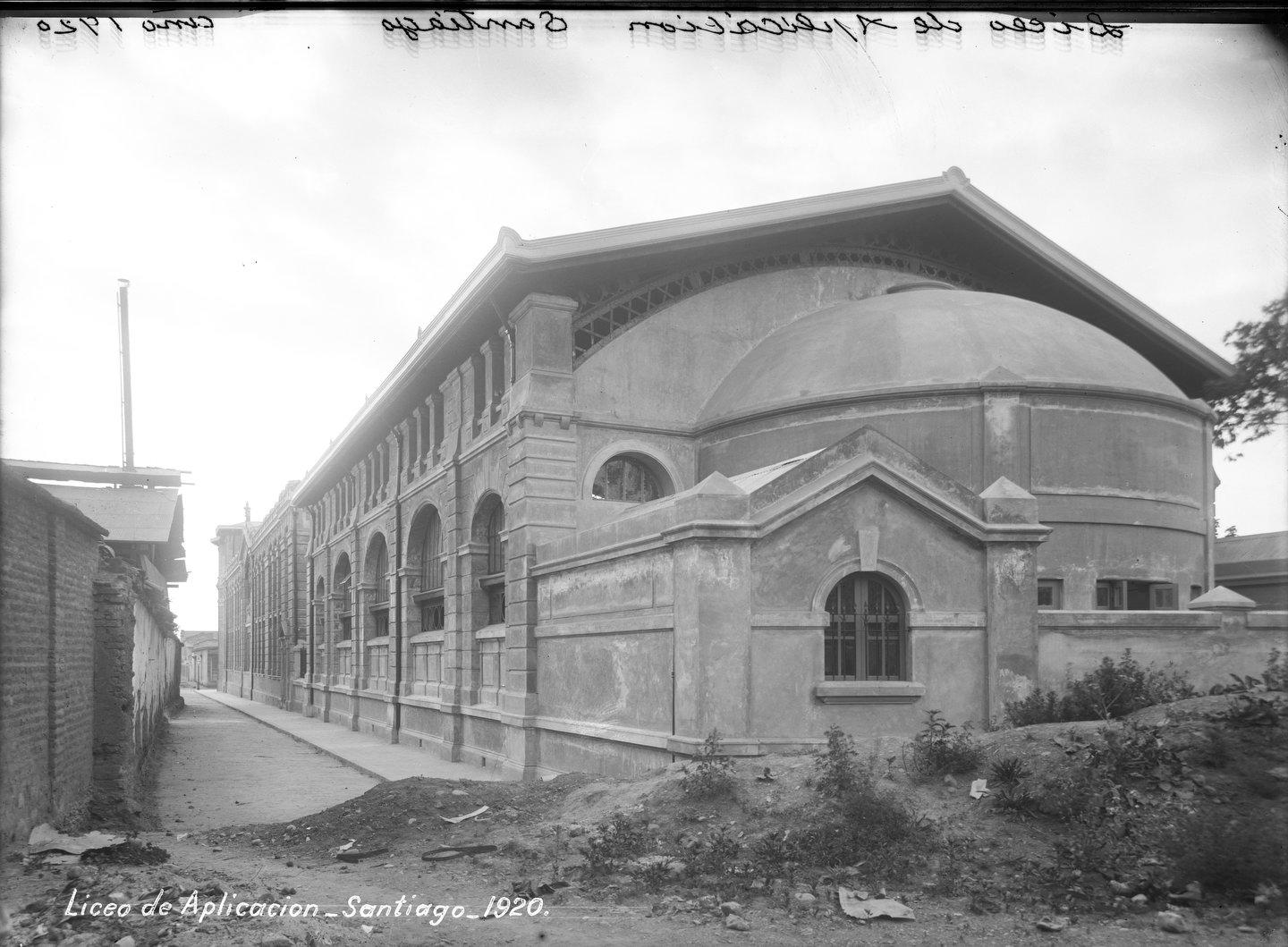 Este es probablemente el Liceo más emblemático construido en Santiago durante las primeras décadas del siglo XX.